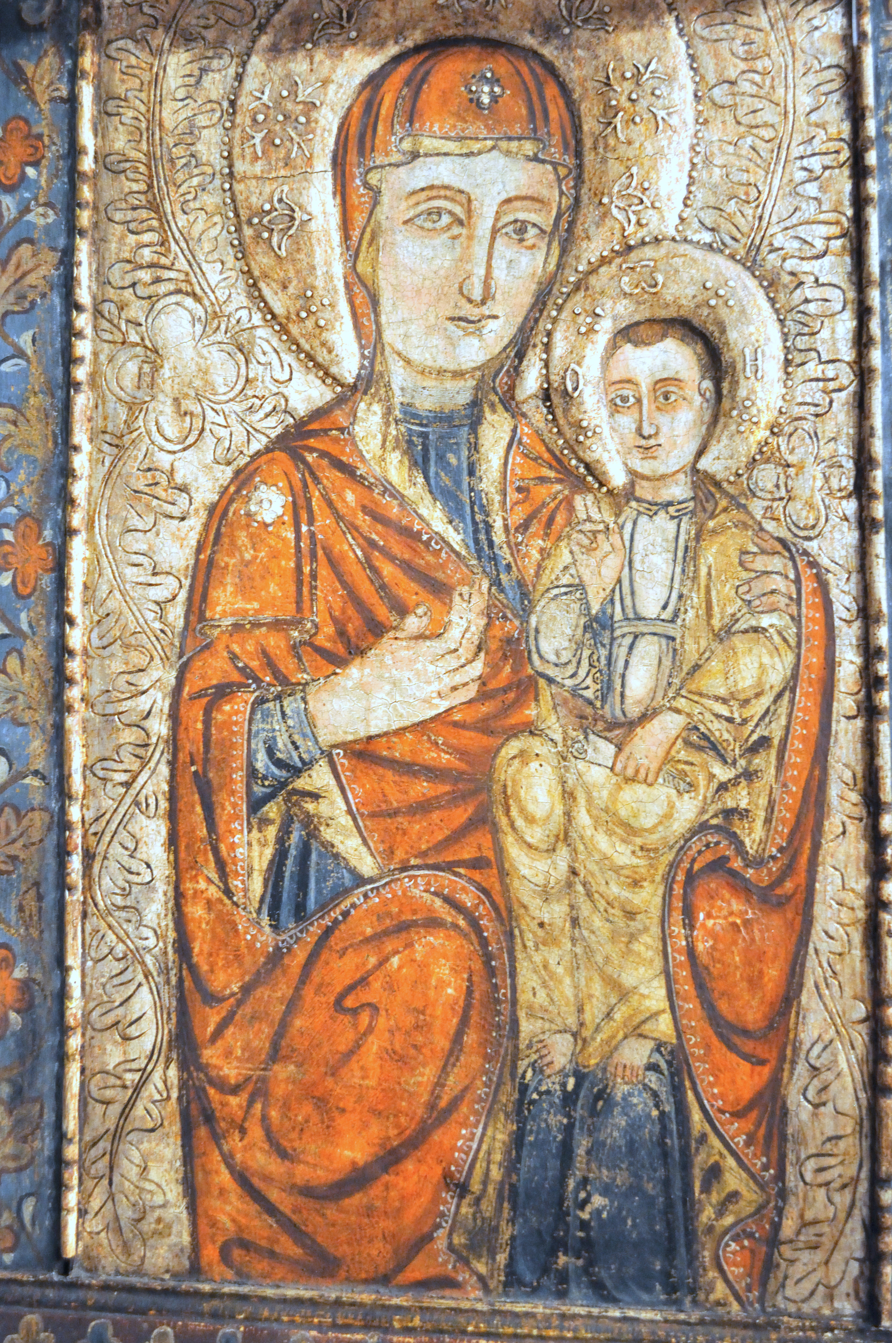 Biserica de lemn „Cuvioasa Paraschiva" din Desești, județul Maramureș